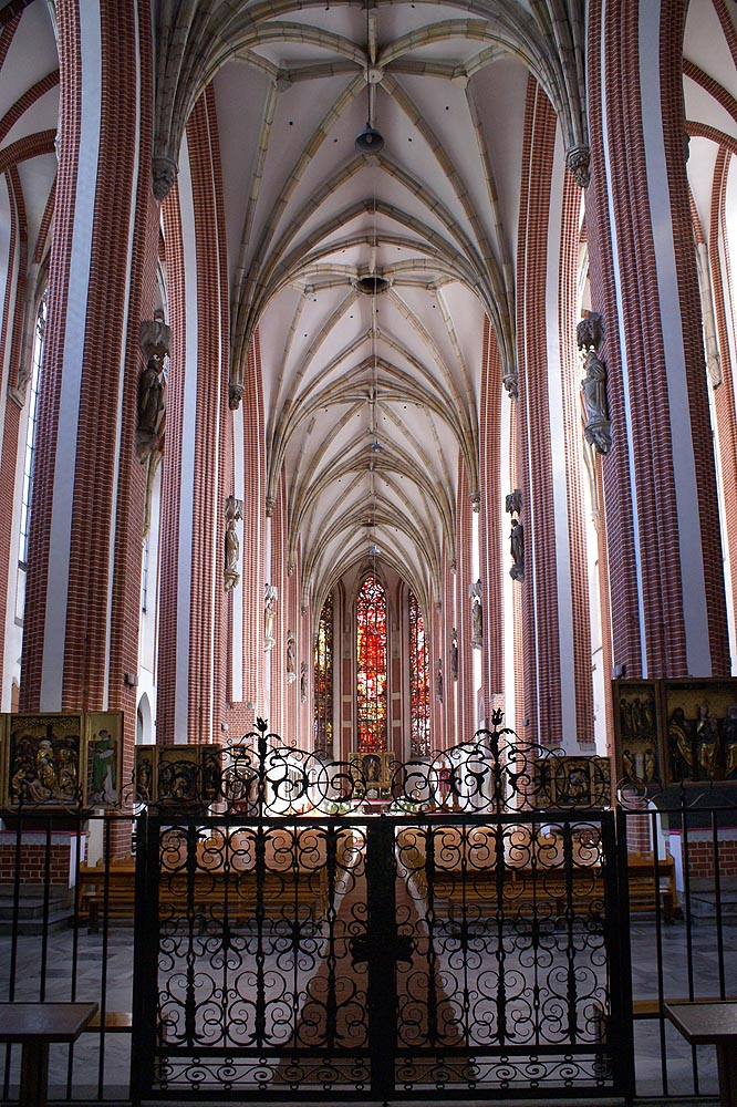 Kościół parafialny NM Panny „Na Piasku” , d. klasztorny św. Jadwigi, Miasto Wrocław - Śródmieście